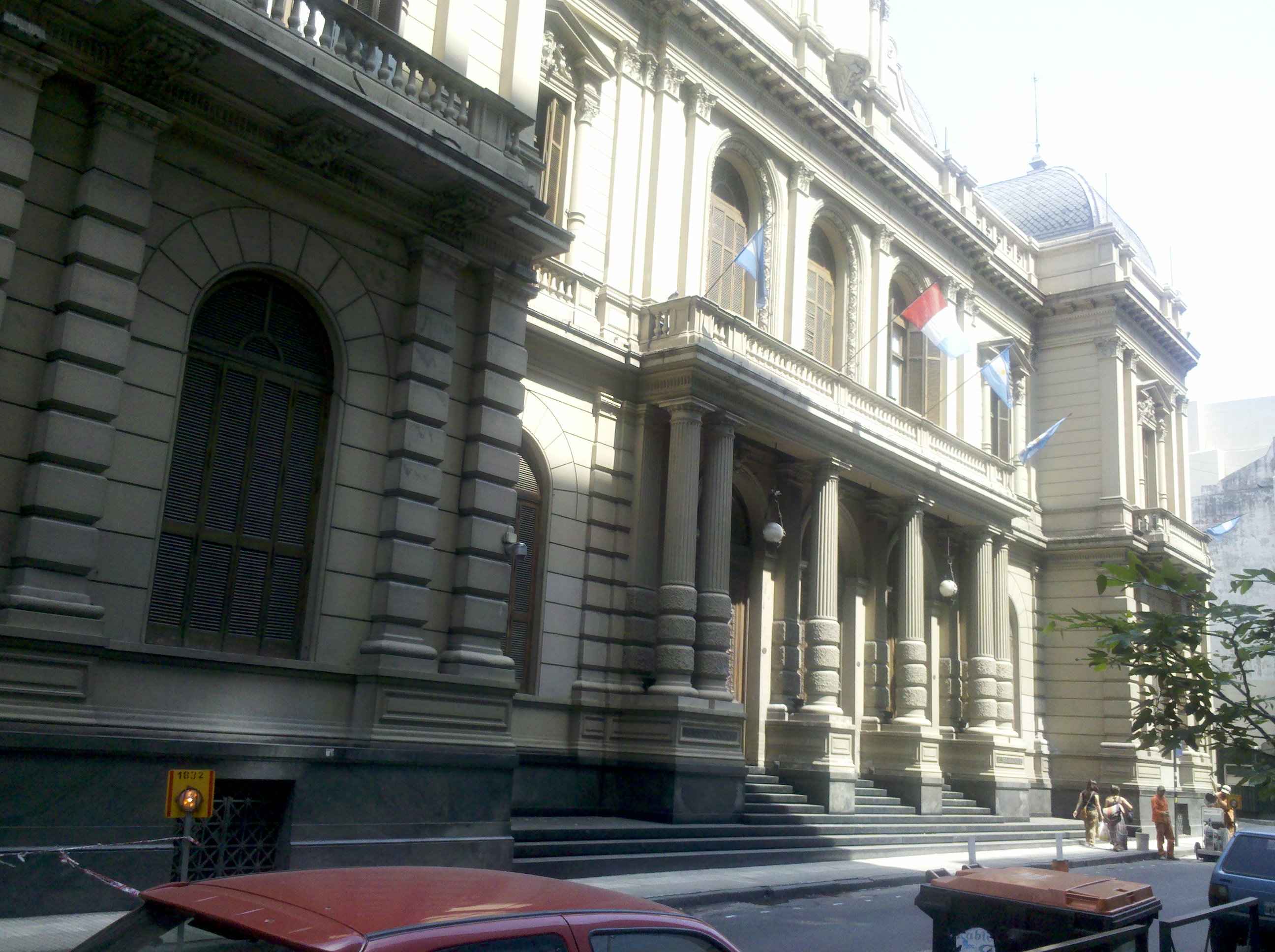 Banco de la Provincia de Córdoba